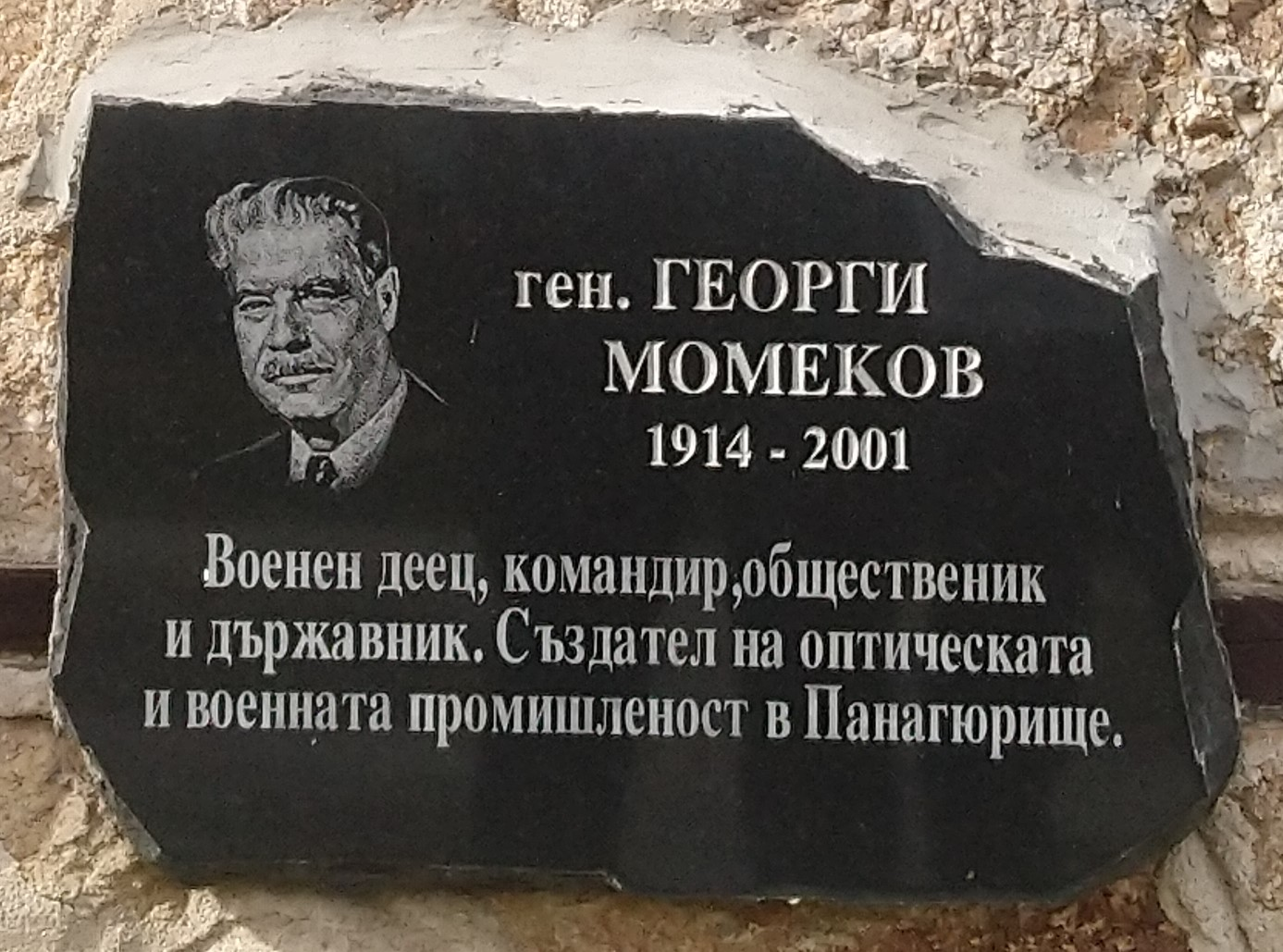 ген. Георги Момеков (1914 - 2001) - плоча в Исторически музей Панагюрище - Надпис: Военен деец, командир, общественик и държавник. Създател на оптическата и военната промишленост в Панагюрище.